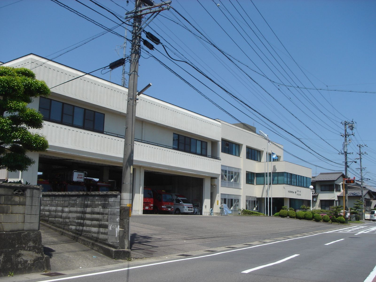 (可茂消防事務組合 中消防署),Minokamo,Gifu,Japan(岐阜県美濃加茂市)で撮影。